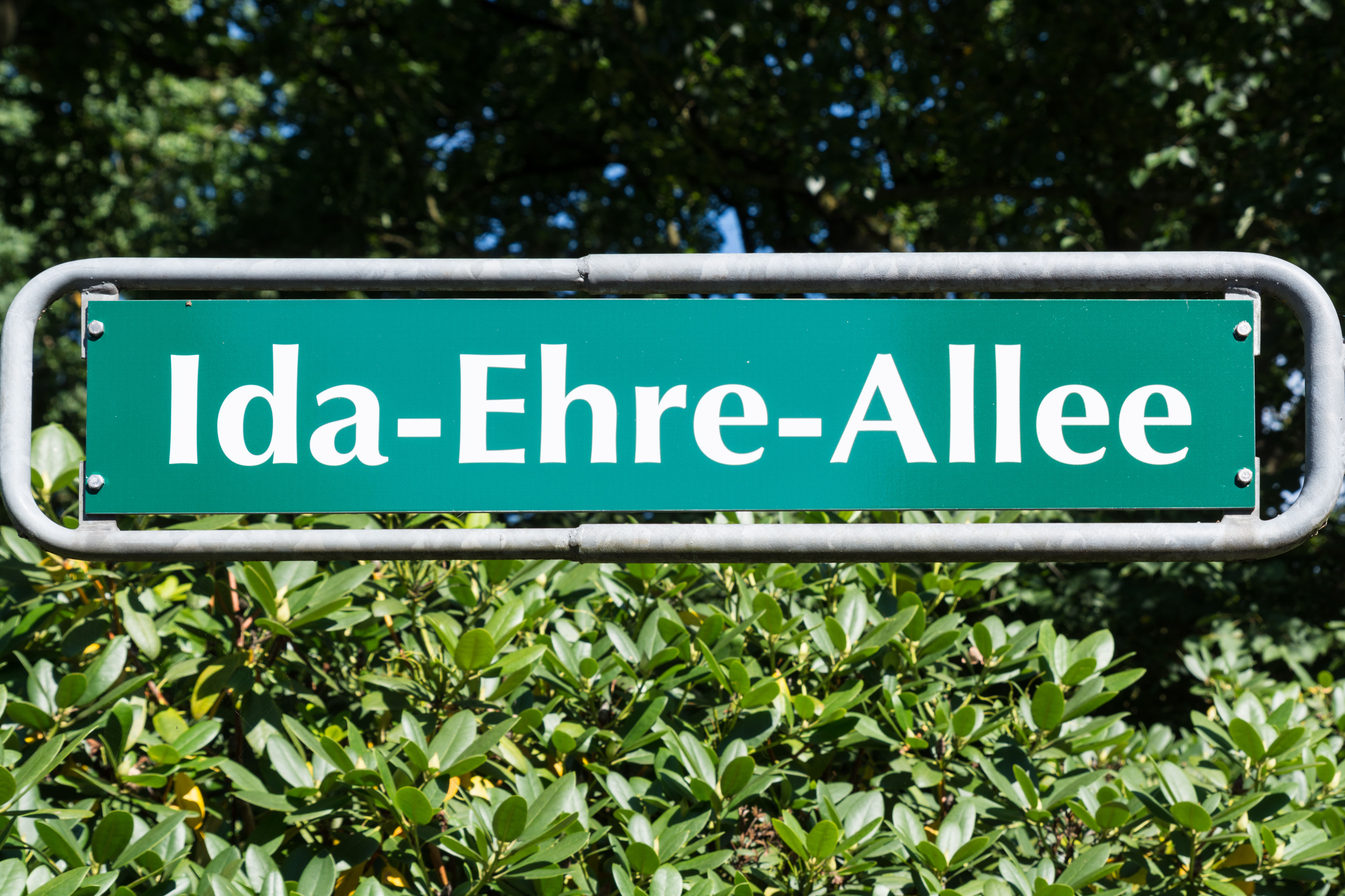 Straßenschild Ida-Ehre-Allee auf dem Friedhof Hamburg-Ohlsdorf.